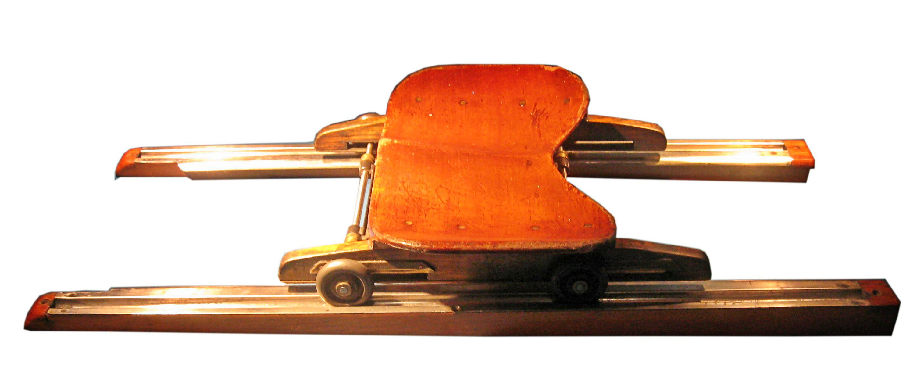 Rollsitz eines Ruderboots